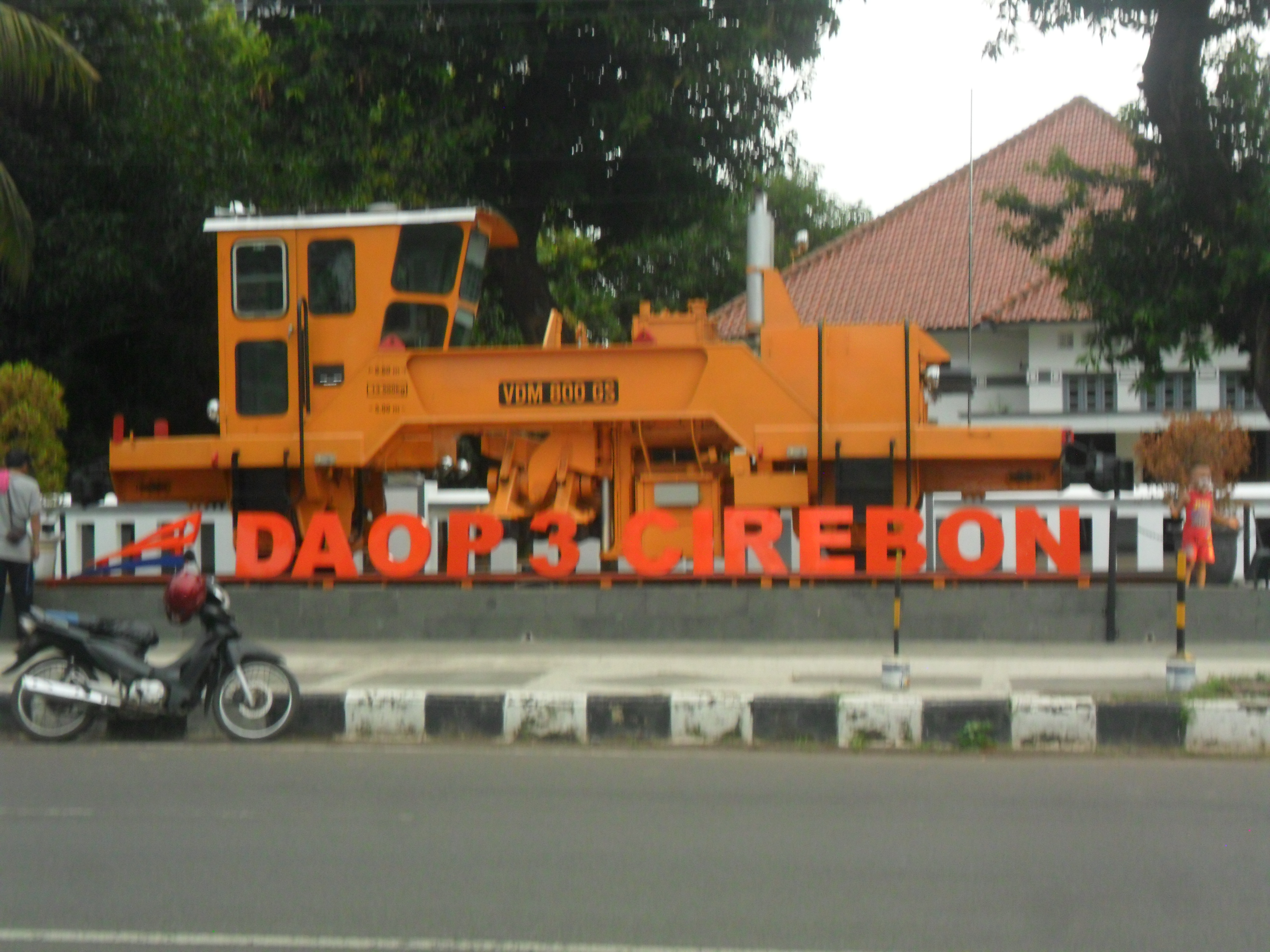 DAOP 3 Cirebon